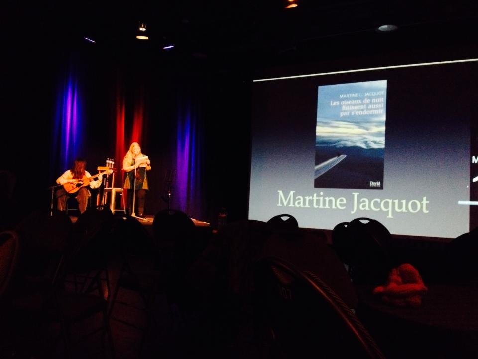 Martine L. Jacquot lit, accompagnée à la guitare, lors de sa lecture publique dans le cadre de 43 200 secondes (marathon littéraire créé par le revue Ancrages) en 2016.